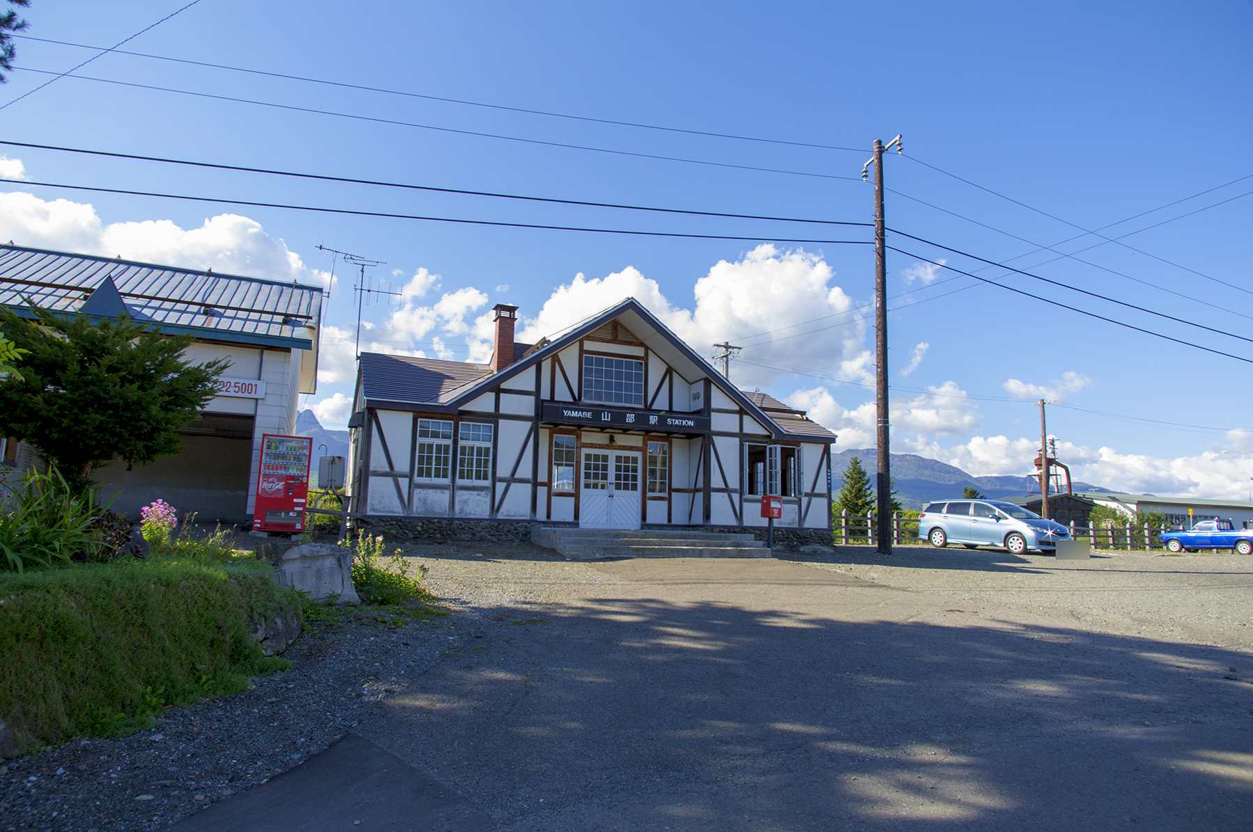 北海道旅客鉄道株式会社根室本線山部駅